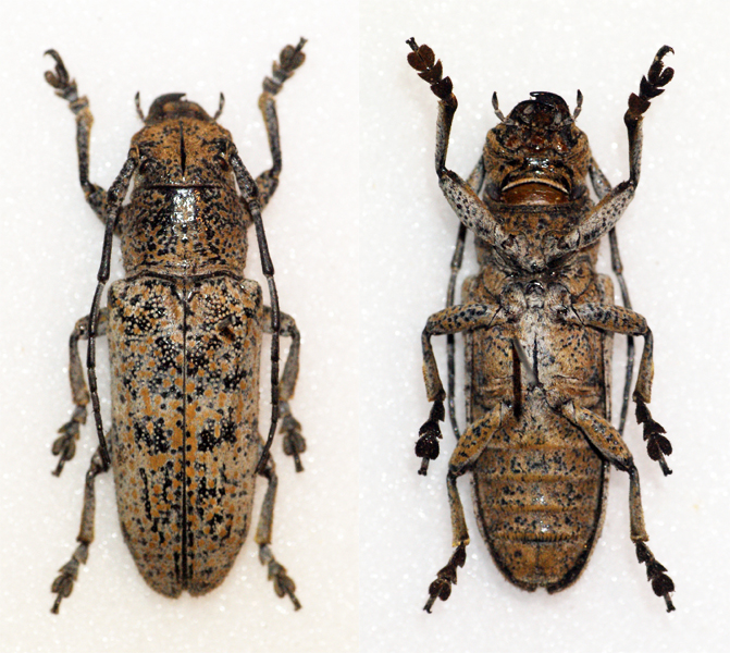 Schultze,1920 Sex: ? Data: 05-2013 - Negros - Central Viscayas - Philippines